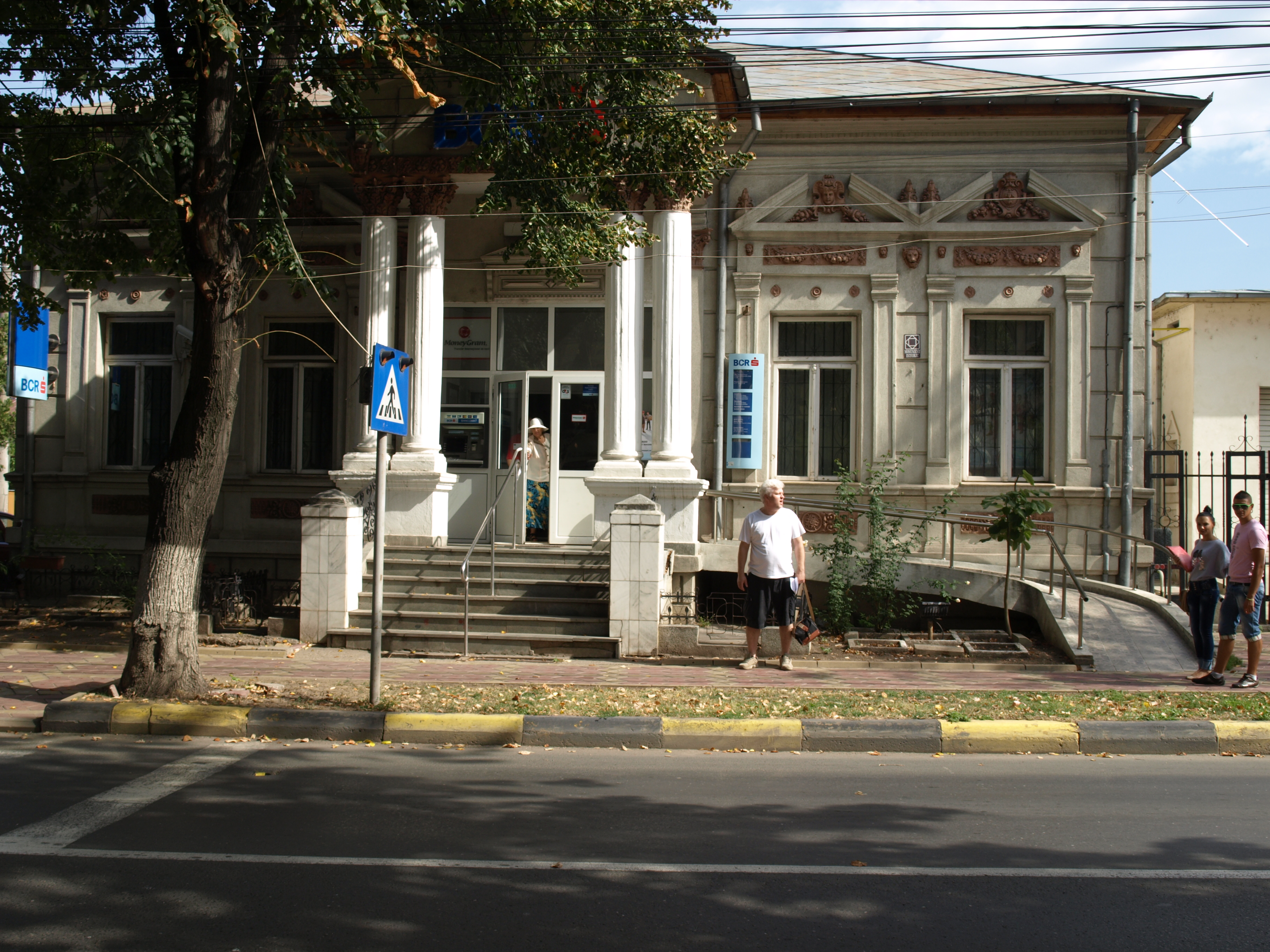 Hanul Goleri, azi B. C. R. - Tecuci